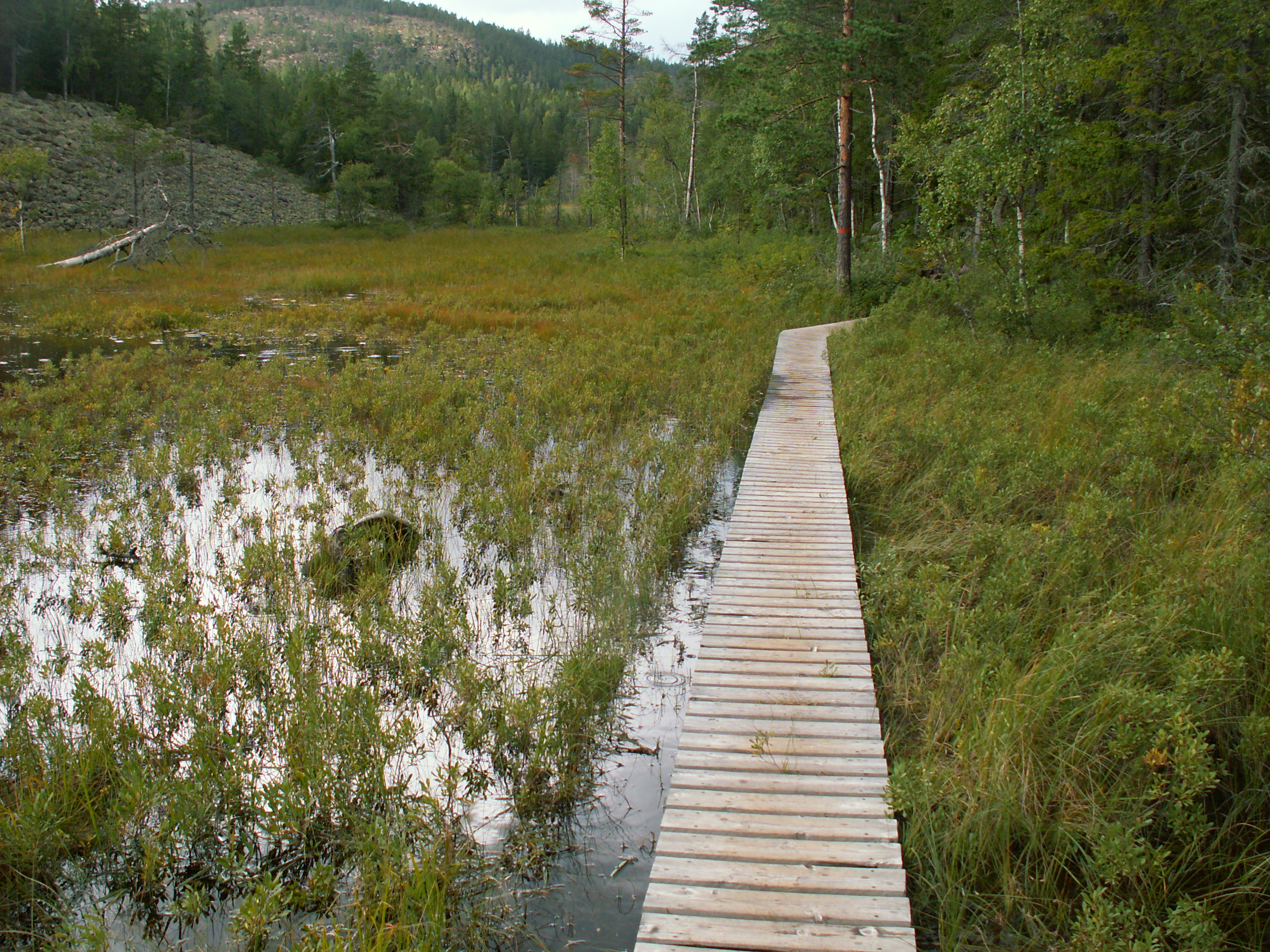 Swamp in Skuleskogen national park